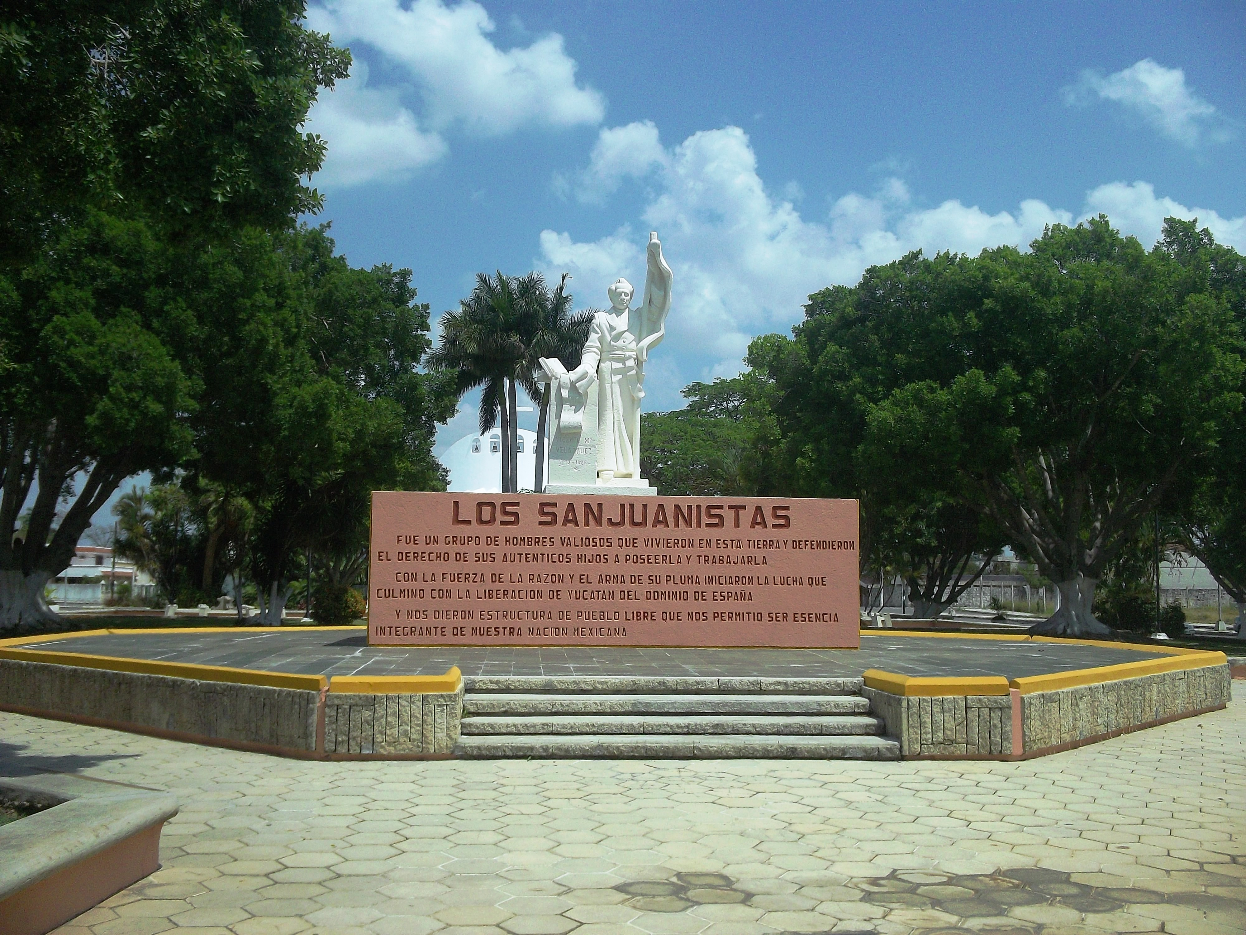 Monumento a los Sanjuanistas en el Parque Sanjuanistas, Mérida, Yucatán.